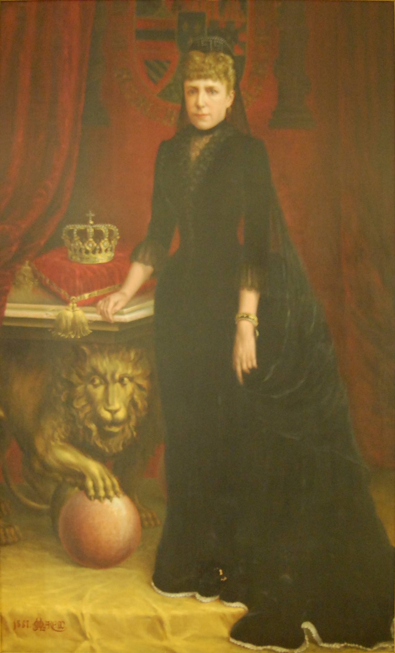 Retrato de cuerpo entero de la reina María Cristina de Habsburgo-Lorena (1858-1929), que fue la segunda esposa del rey Alfonso XII de España y la madre del rey Alfonso XIII. Fue pintado por Manuel Laredo en 1887, y actualmente se expone en el Ayuntamiento de Alcalá de Henares.